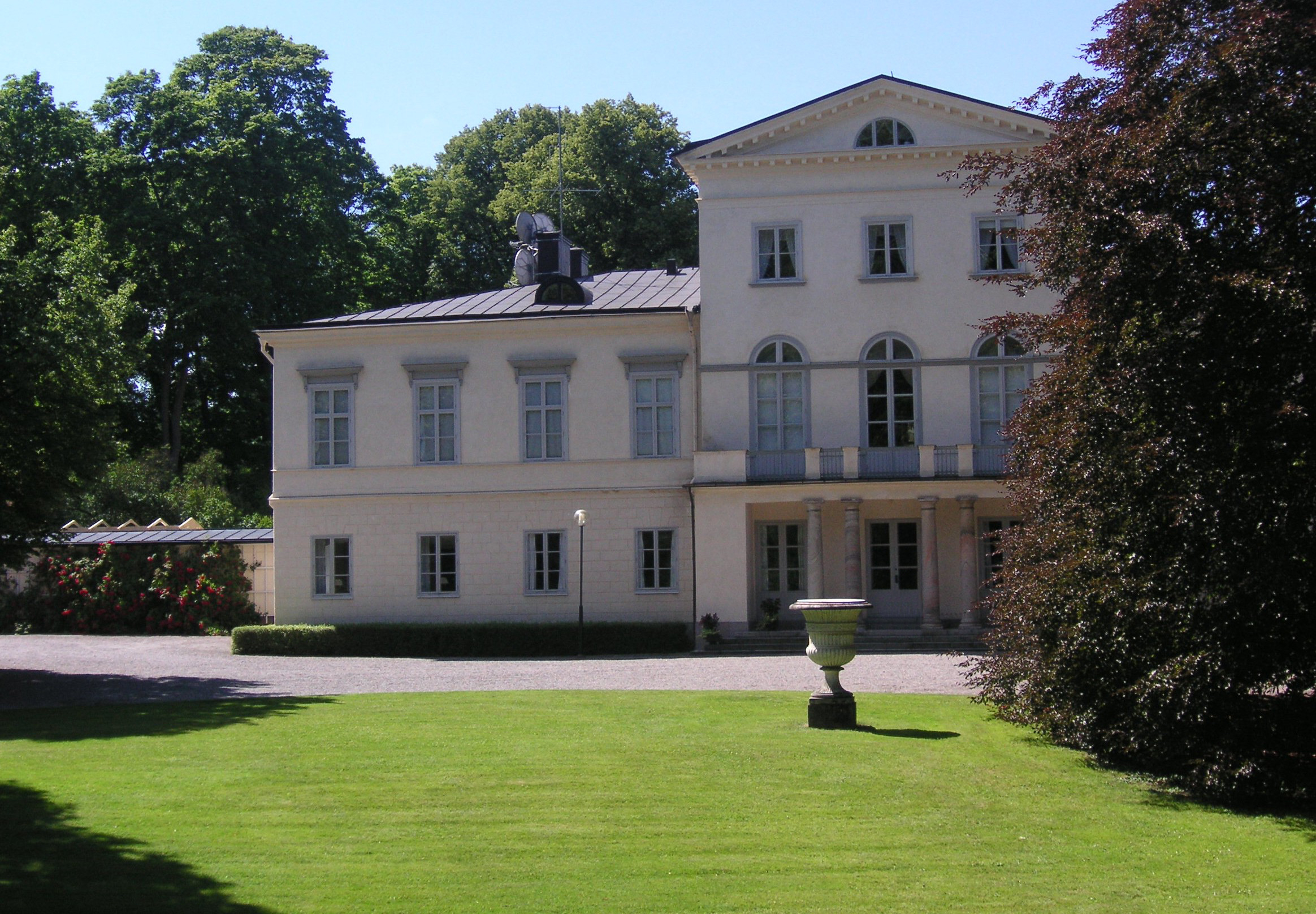 Haga slott i Hagaparken